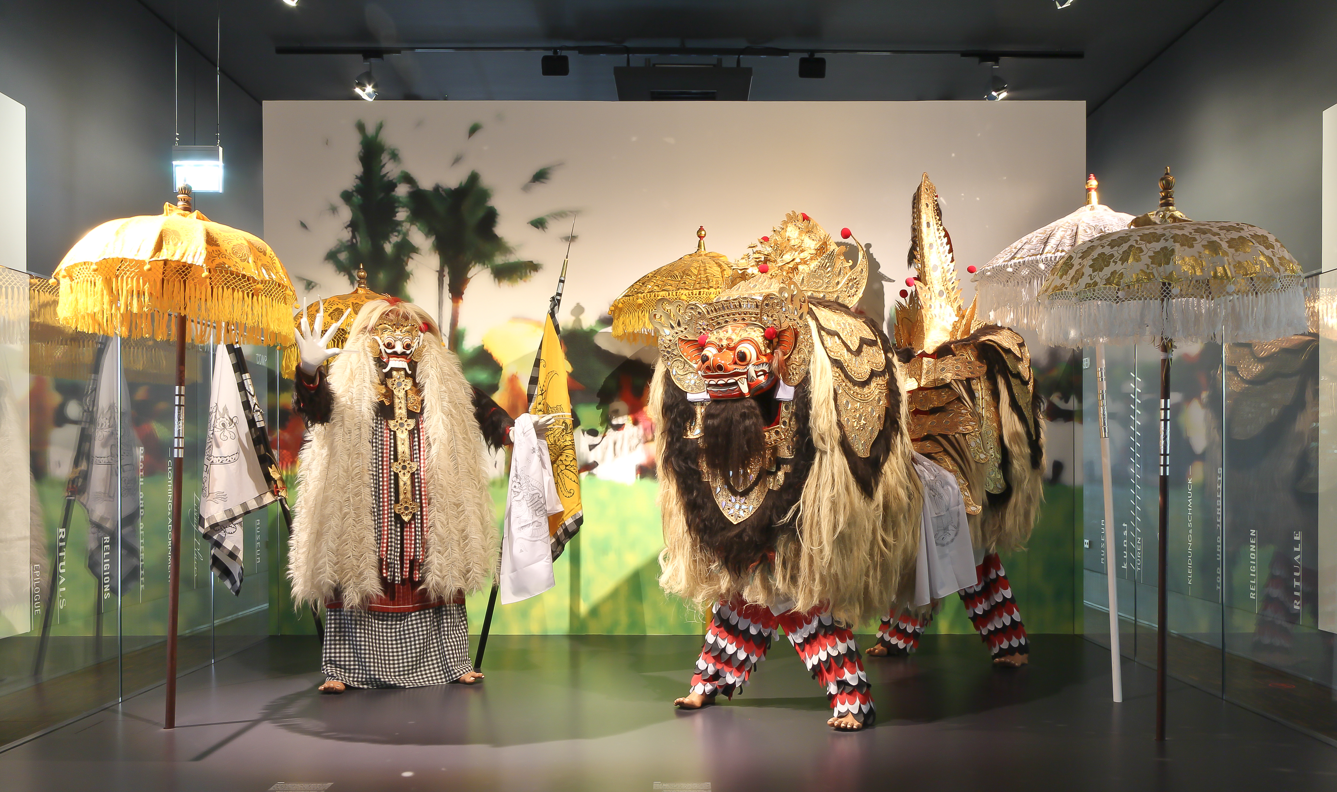 Rangda, auf Bali eine Form der gefürchteten Todesgöttin Durga. Singapadu, Südbali, Indonesien, Südostasien